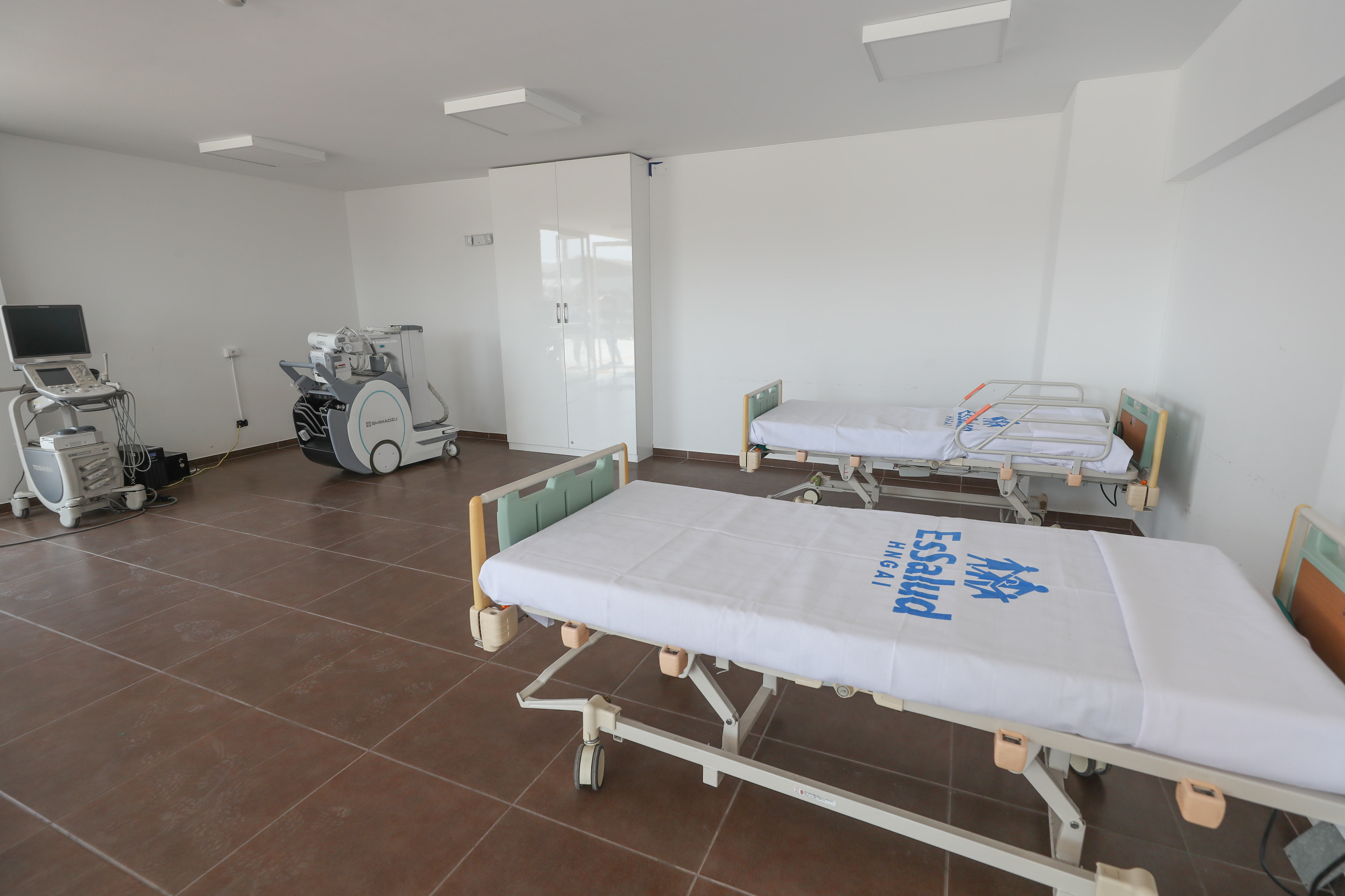 MINISTRO DE DEFENSA SUPERVISÓ TRABAJO DE LAS FFAA EN LA VILLA PANAMERICANA